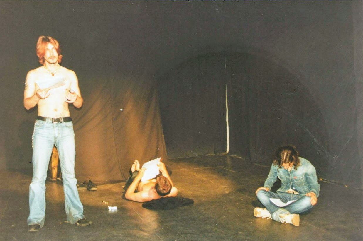 Слева - драматург и актер Юрий Кладиев. Читка пьесы. Фестиваль "Майские чтения", театральный центр "Голосова 20", Тольятти. Россия.